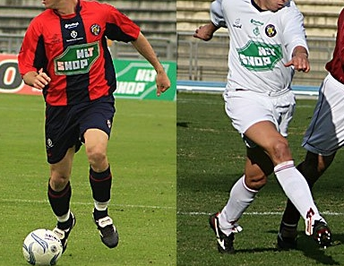 Fortitudo Cosenza, prima e seconda maglia 2007-2008